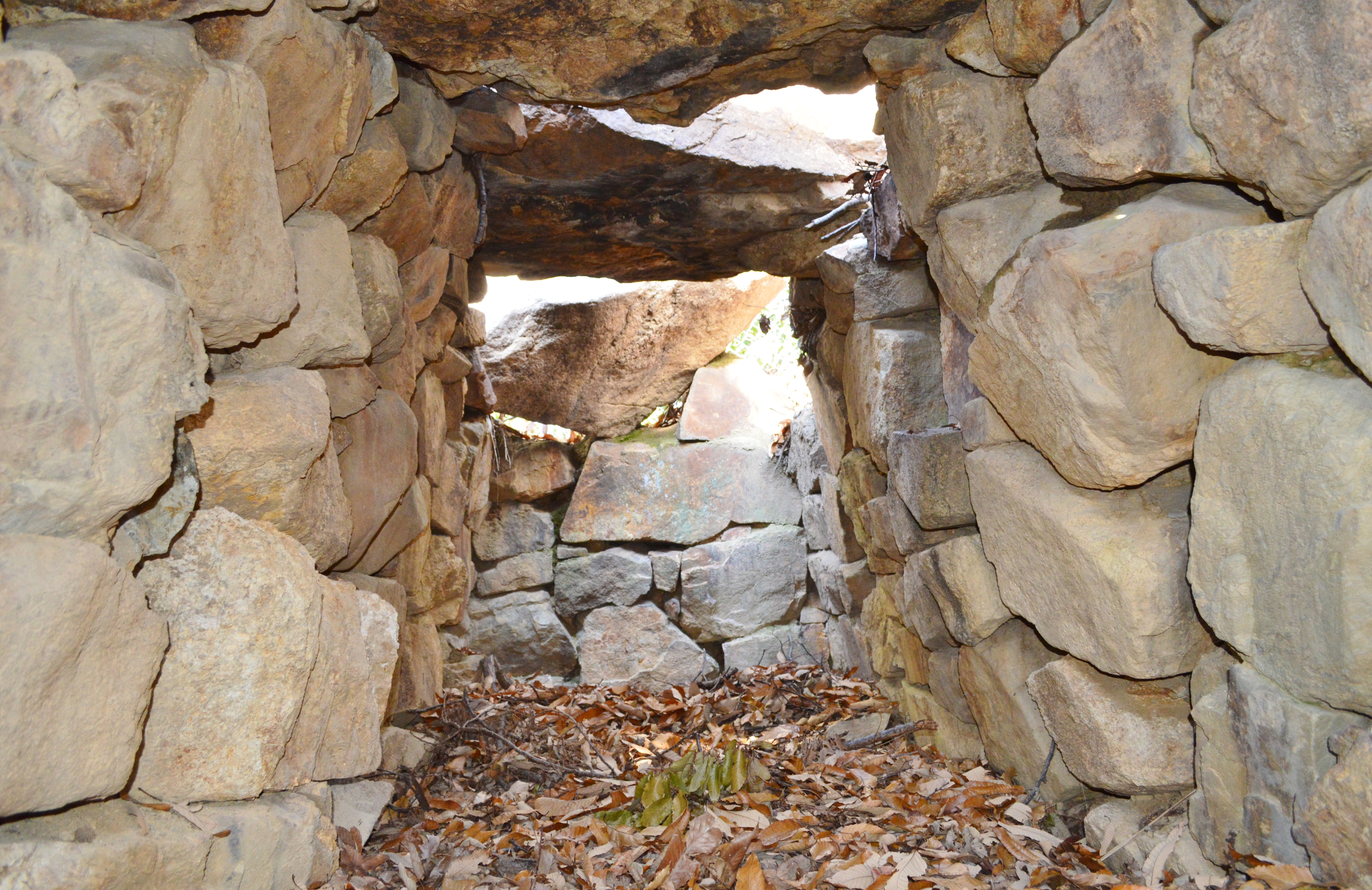 二子塚古墳 (池田市) 石室玄室